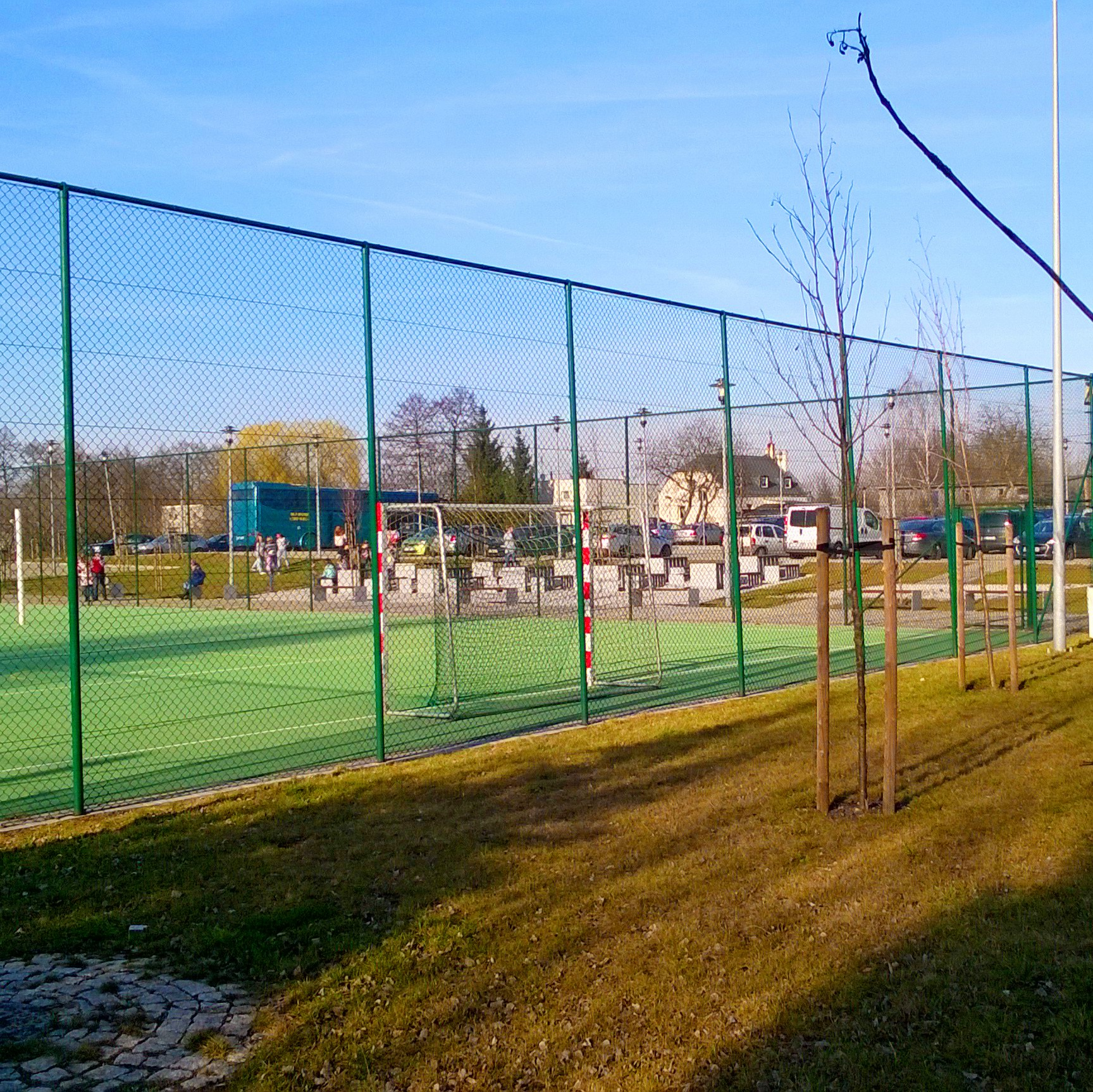 Międzynarodowe Centrum Spotkań Młodzieży w Toruniu88